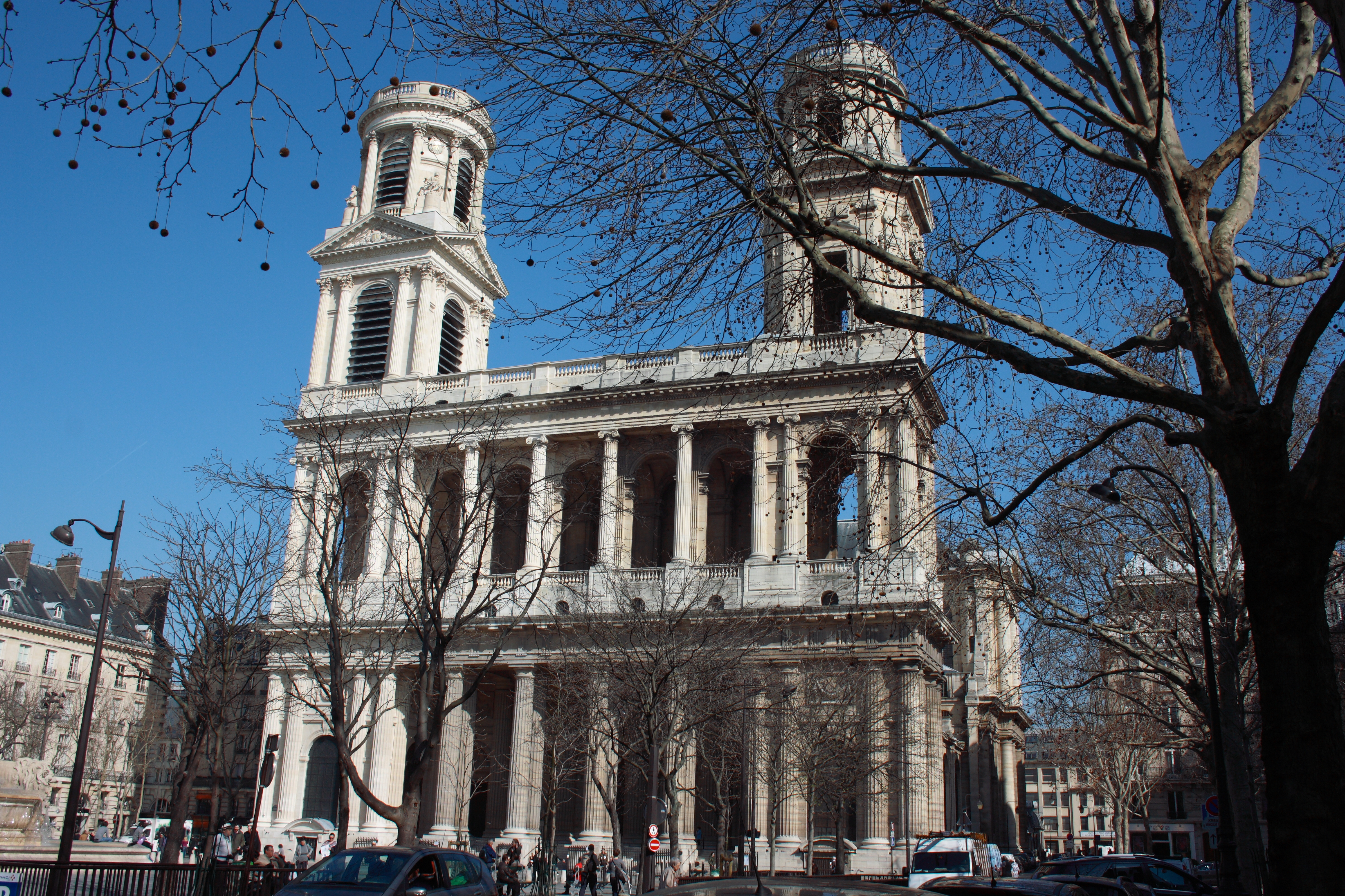 Katholische Pfarrkirche St-Sulpice im 6. Arrondissement von Paris Object location48° 51′ 03.56″ N, 2° 20′ 05.75″ E